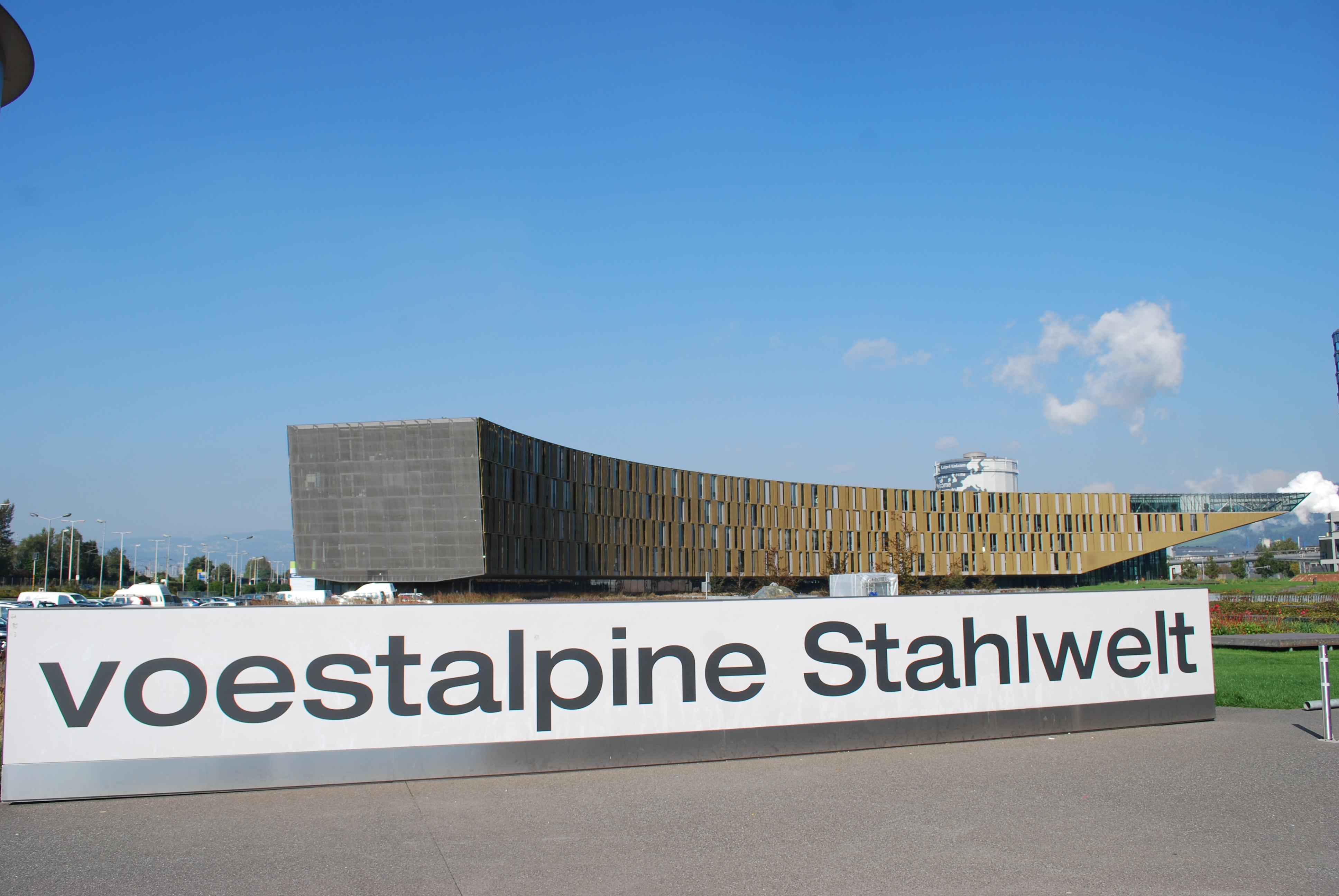 voestalpine Stahlwelt Schriftzug, in Linz, im Hintergrund jedoch nicht das Besucherzentrum